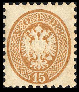 Последняя почтовая марка Венецианской области